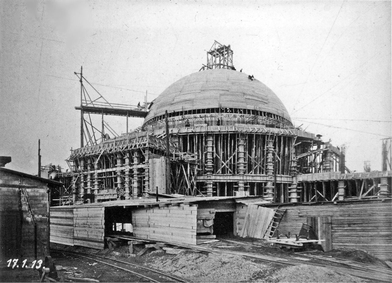 Bau der Messehalle 2 (16), sogenannte Betonhalle, heute Alte Messe, 1913. Errichtet von Wilhelm Kreis für die Internationale Baufachausstellung.